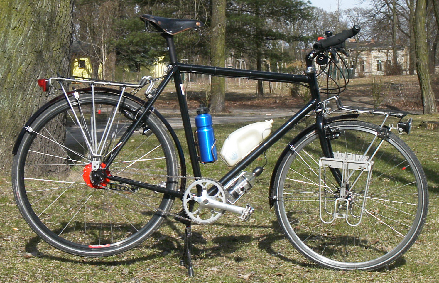 Reiserad mit Rohloff Speedhub Nabenschaltung